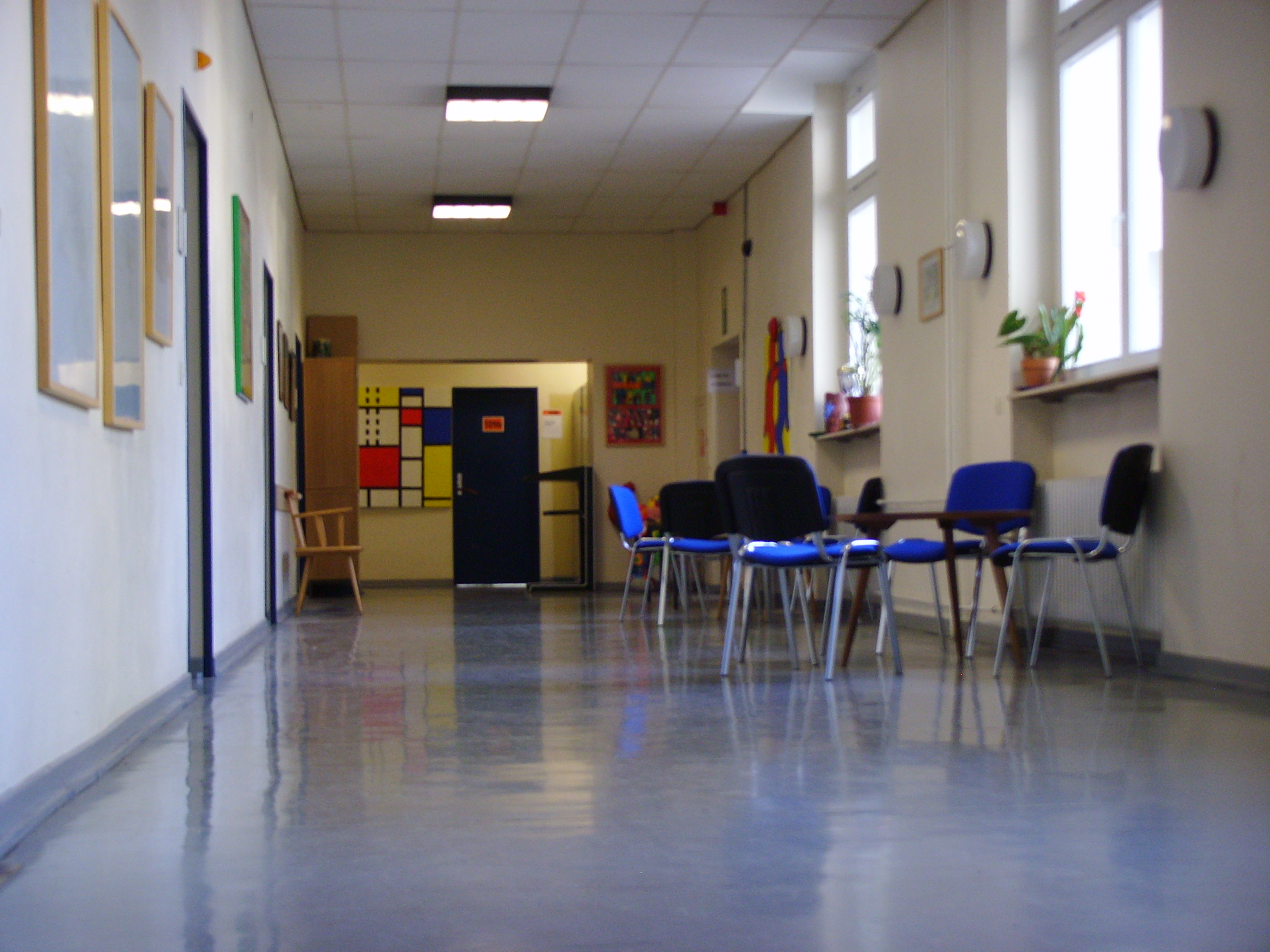 Ziehenschule, Frankfurt am Main-Eschersheim, Flur vor dem Rektorat